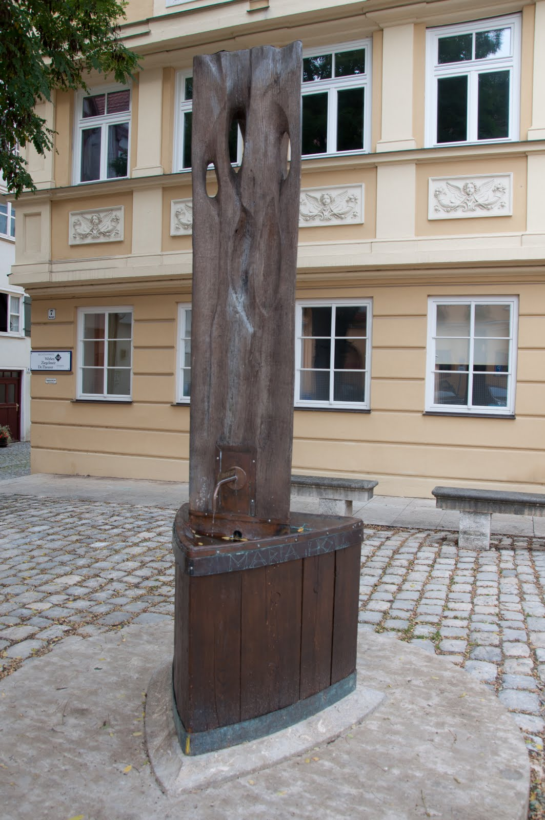 Maria-Holl-Brunnen in Nördlingen am Weinmarkt. Dies ist ein 1966 errichtetes Denkmal für Maria Holl, die 1593 als angebliche Hexe fast ein Jahr lang inhaftiert wurde. Als sie nach 62 Folterungen immer noch kein Geständnis abgelegt hatte, wurde sie wieder freigelassen. Inschrift Der standhaften Maria Holl zum Gedenken